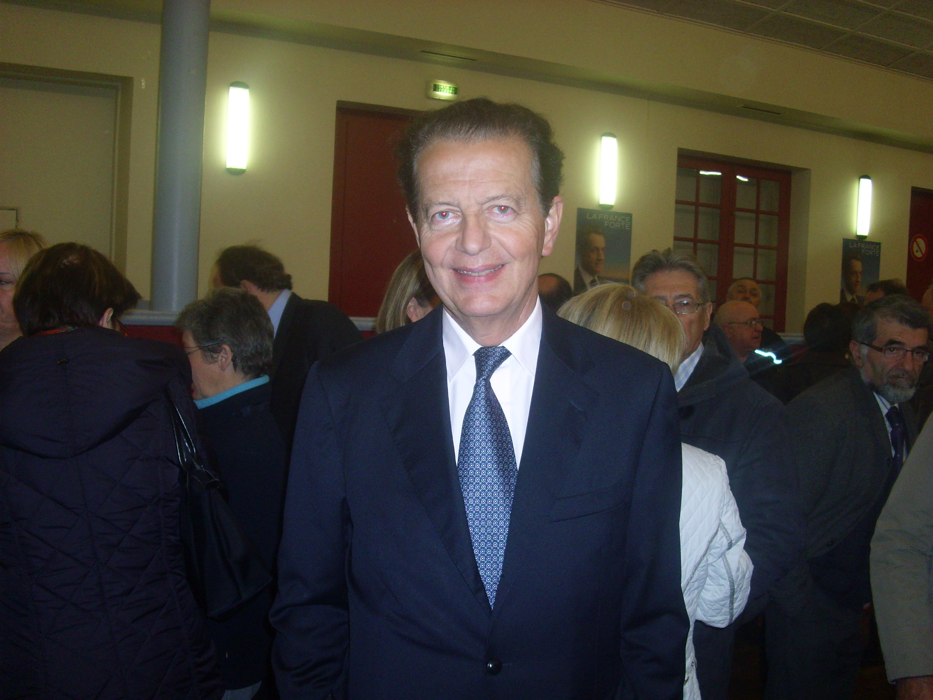 Dominique Perben Givry während einer öffentlichen Sitzung mit Jean-Paul Anciaux 26. April 2012